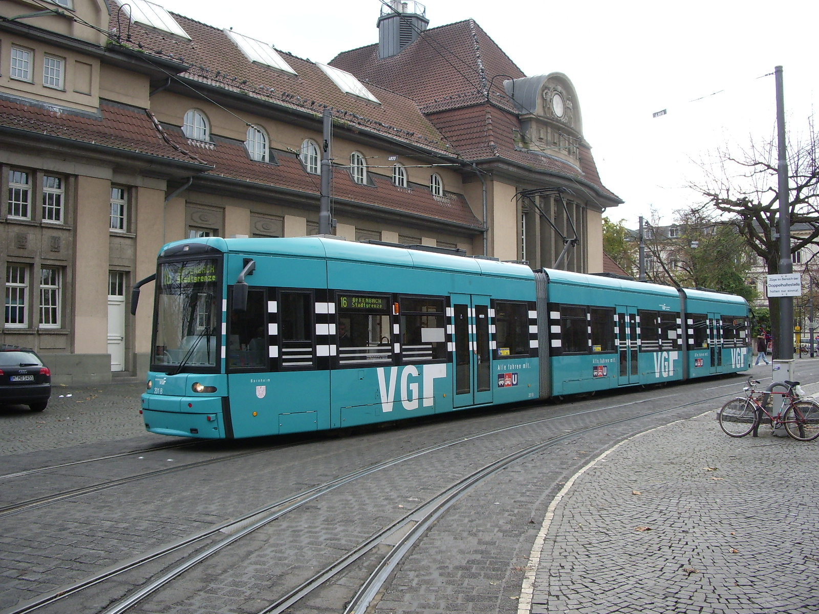 VGF tram S 201 at Südbahnhof, Frankfurt am Main, November 29 2005. Photo by myself, GNU-FDL. VGF-Straßenbahnwagen S 201 am Südbahnhof, Frankfurt am Main, 29. November 2005. Selbst fotografiert, GNU-FDL.